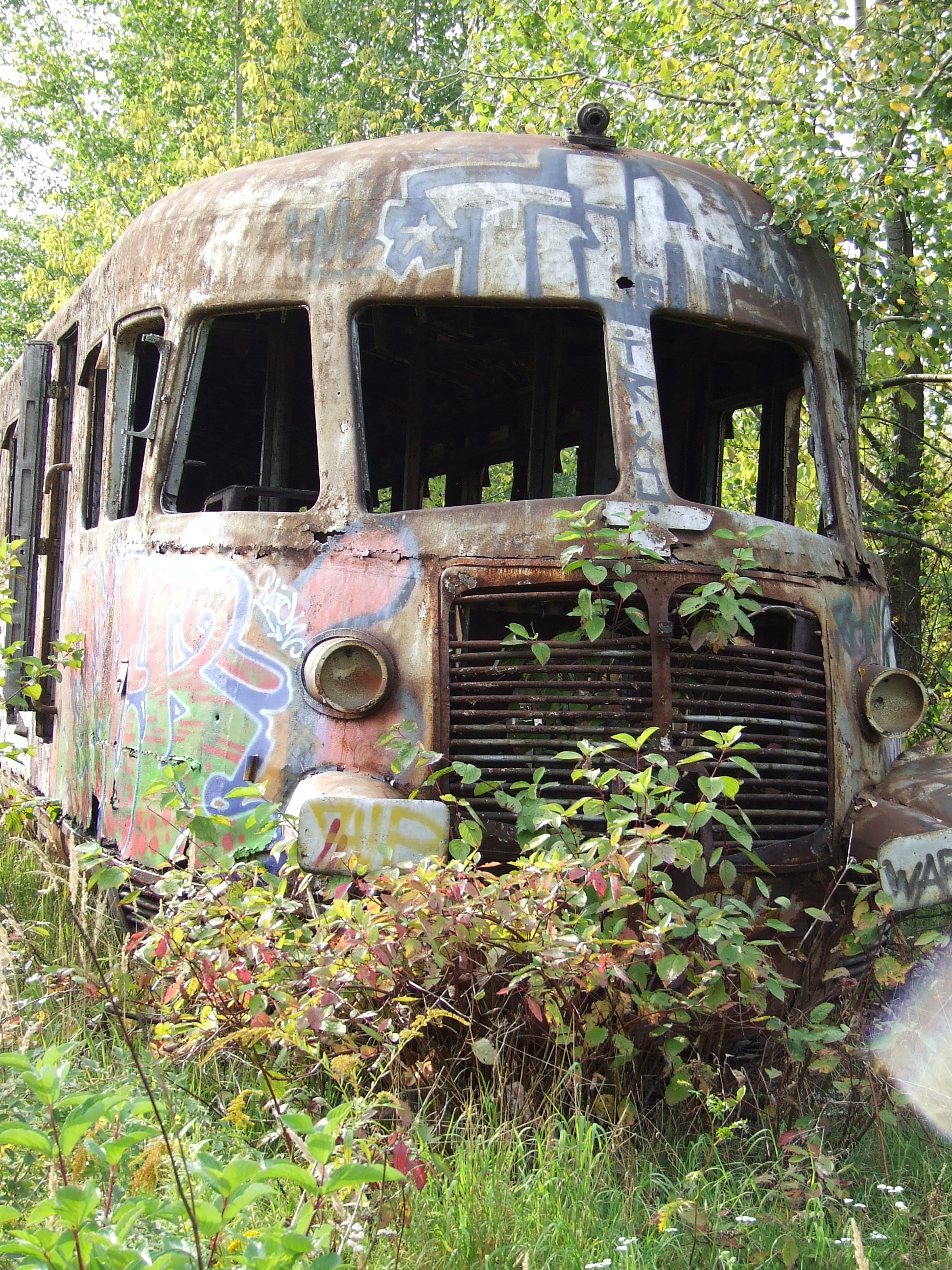 Niszczejący wrak wagonu silnikowego produkcji włoskiej SD80, jedyny istniejący już egzemplarz, Warszawa